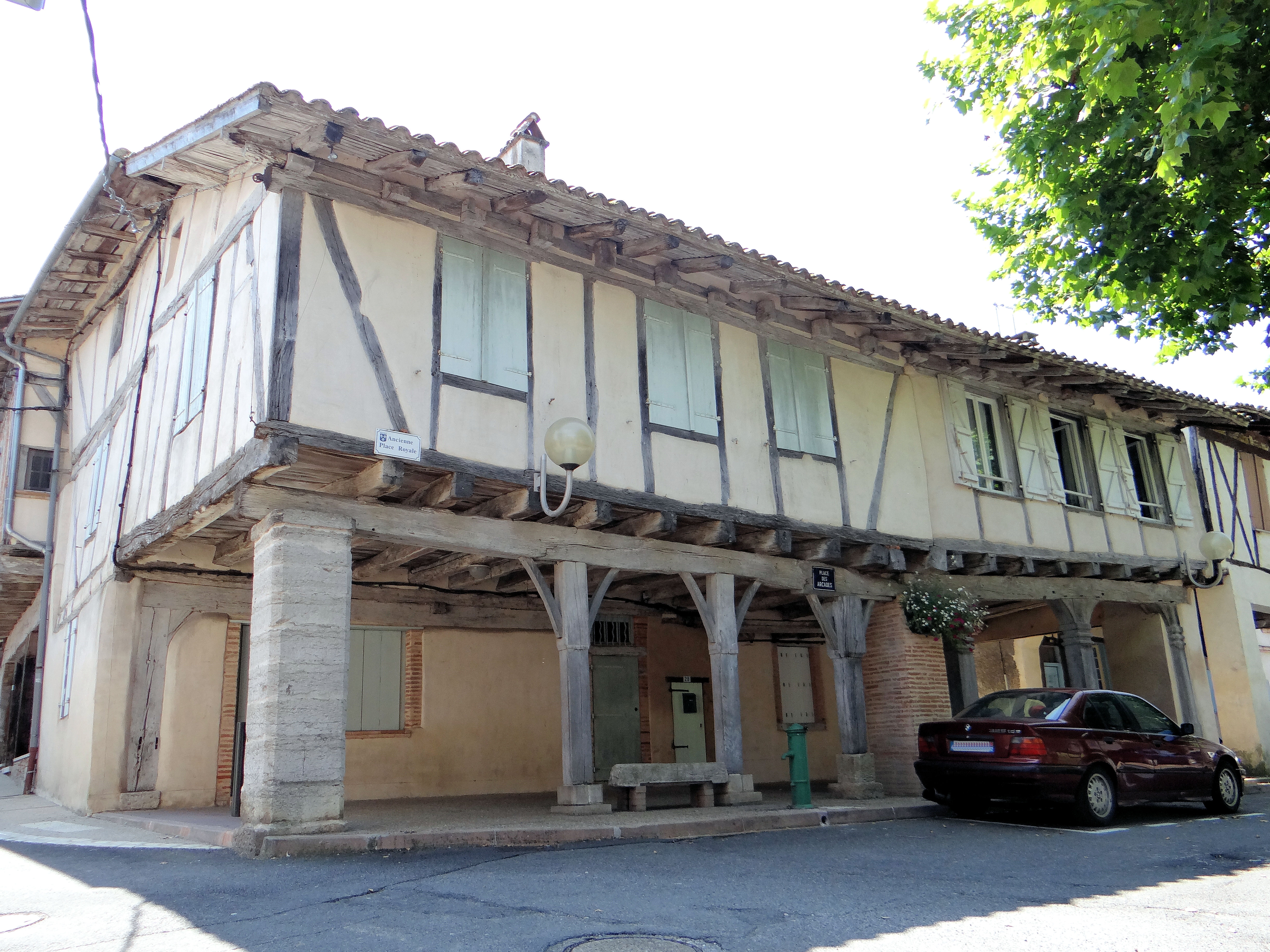 Réalville - Place des Arcades (ancienne place Nationale ou place Royale)